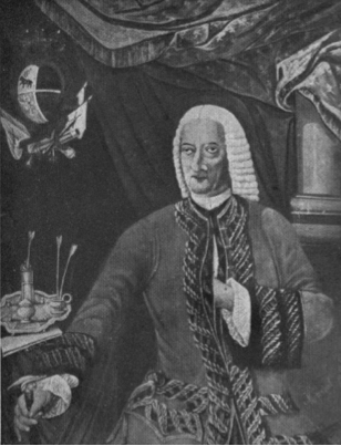 Antoni d'Alòs i de Rius.